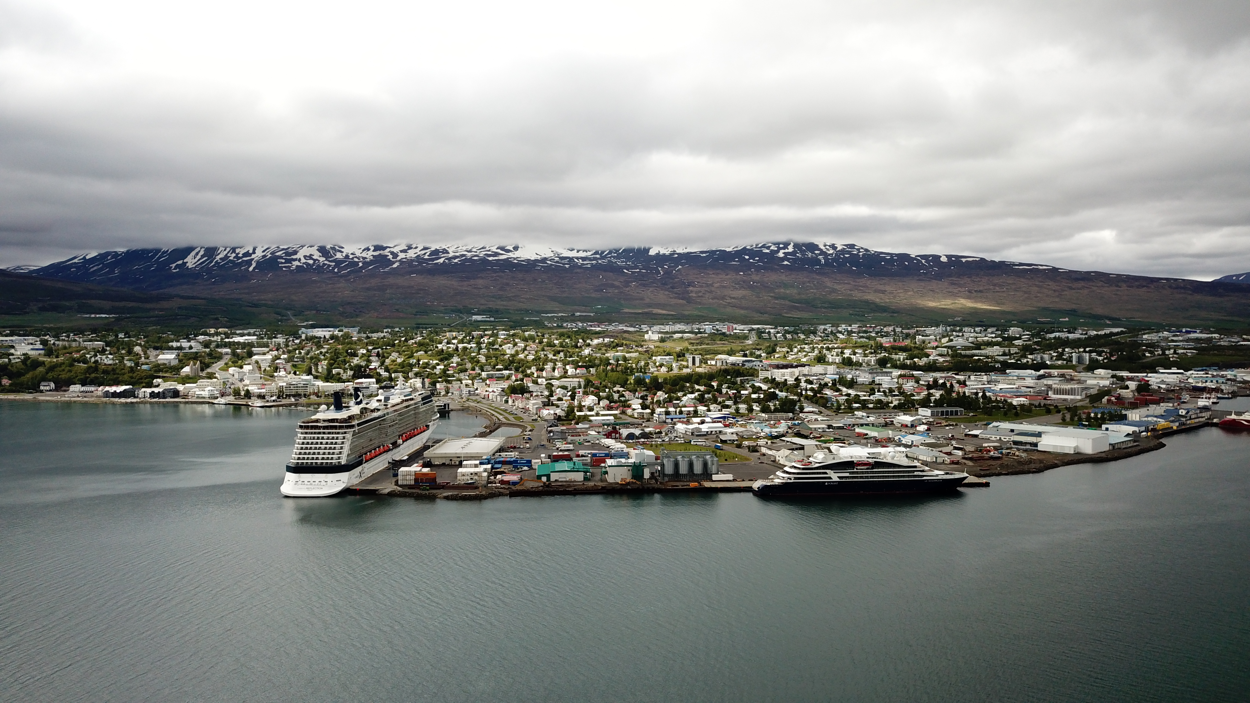 Акюрейри, Исландия Akureyri, Iceland